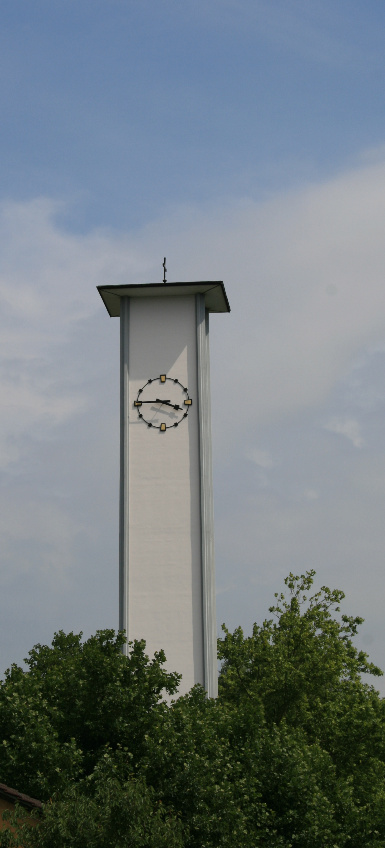 Kirchturm St. Anton-Kirche, Wettingen AG, Schweiz